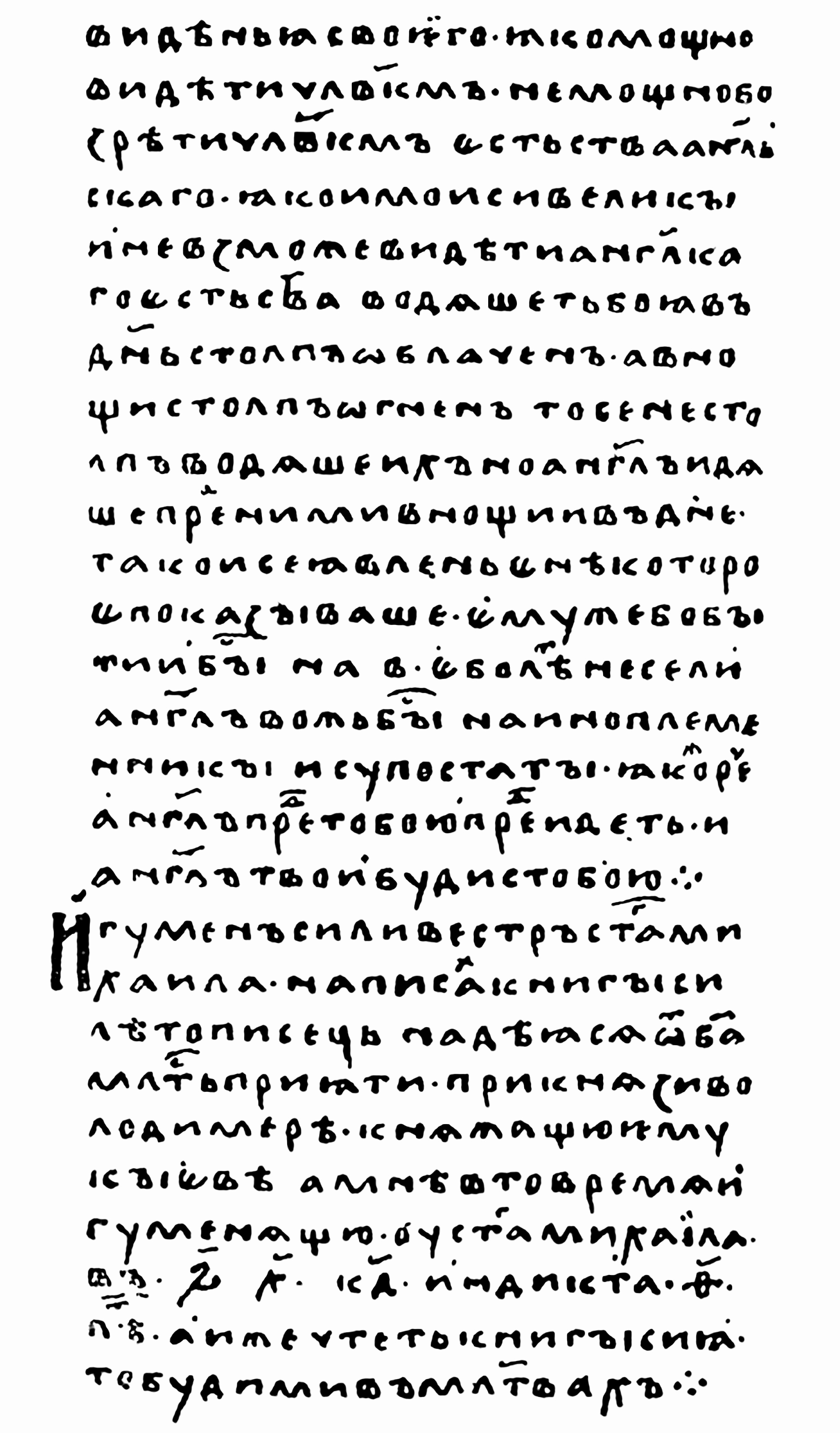 Lavrentyevskaya Letopis